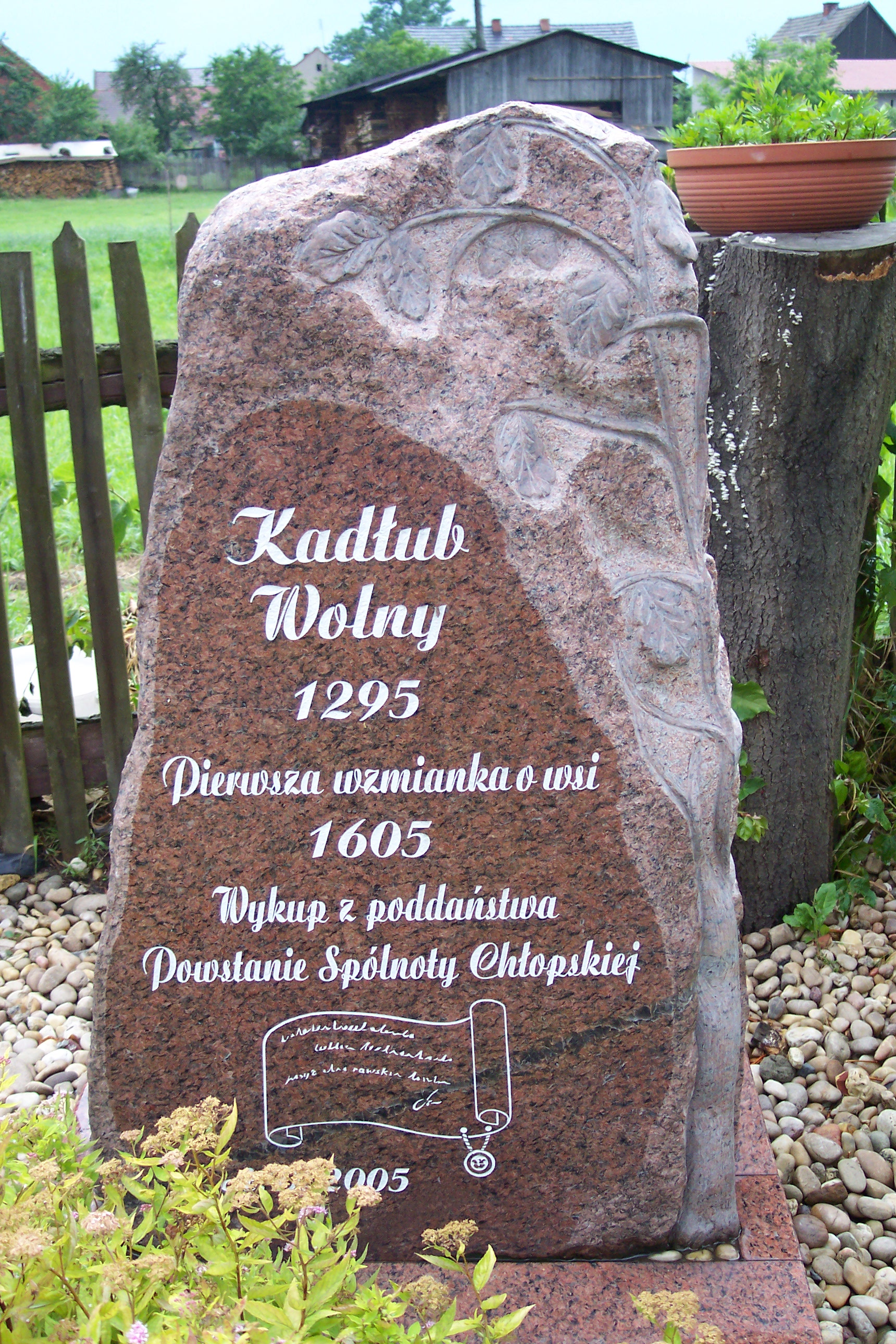 Kamień upamiętniający daty pierwszej wzmianki o Kadłubie Wolnym i wykupu z poddaństwa